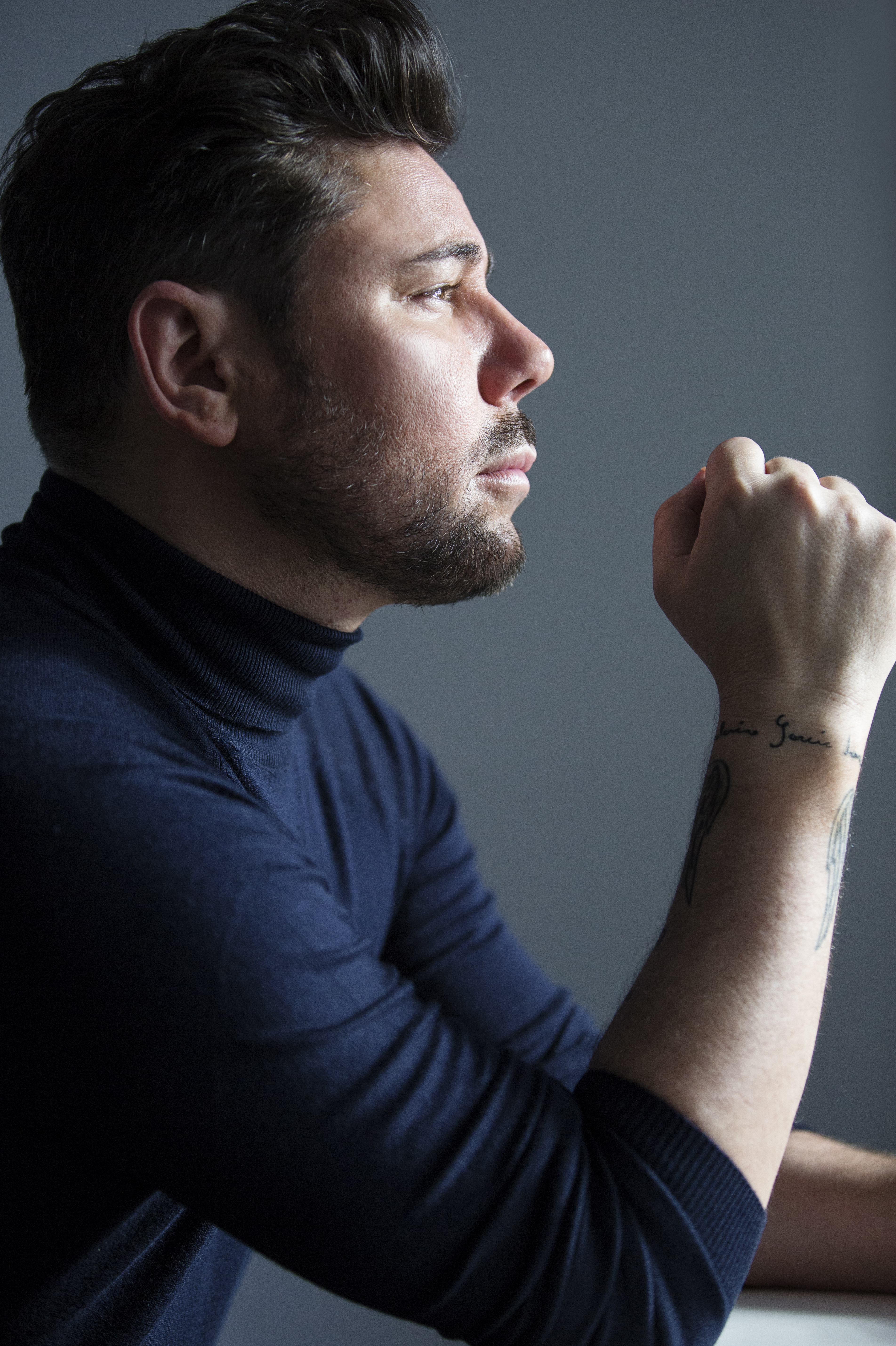 Miguel Poveda